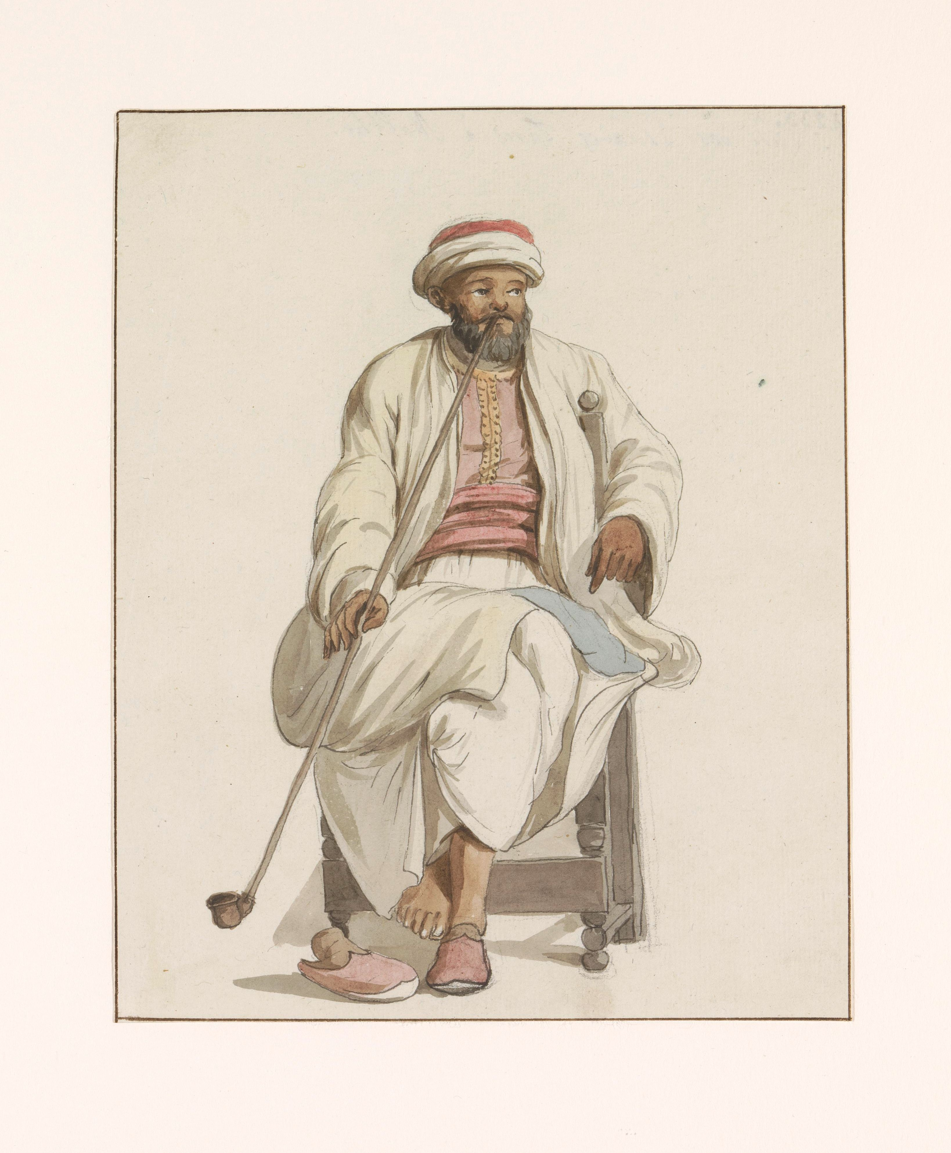 IdentificatieTitel(s): Kadi van de Turkse slaven op MaltaCadi des Esclaves Turcs à Malte (titel op object)Voyage en Italie, en Sicile et à Malte - 1778 (serietitel)Objecttype: tekening aquarel Objectnummer: RP-T-00-494-6BCatalogusreferentie: Niemeijer&De Booy 262Opschriften / Merken: opschrift, verso linksboven, handgeschreven: ‘No 233 Cadi des Esclaves Turcs à Malte’Omschrijving: Kadi (Mohammedaans rechter) van de Turkse slaven op Malta rookt een pijp. Tekening uit het album 'Voyage en Italie, en Sicile et à Malte', 1778.VervaardigingVervaardiger: tekenaar: Louis DucrosDatering: 1778Fysieke kenmerken: zwart krijt, aquarel, pen in grijsMateriaal: papier krijt waterverf Techniek: penseel / penAfmetingen: blad: h 197 mm × b 159 mmOnderwerpWat: slavery; serfs and the enslavedWaar: MaltaVerwerving en rechtenCredit line: Schenking van mevrouw Hansen-van den Brugghen, Den HaagVerwerving: schenking 1948Copyright: Publiek domein